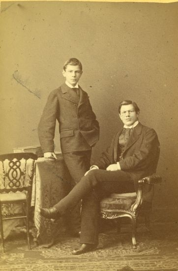 v.l.n.r.: Willy Merck (* 27. Juni 1860 in Darmstadt; † 15. Dezember 1932 ebenda) Emanuel August Merck (* 30. Juli 1855 in Darmstadt; † 26. Februar 1923)